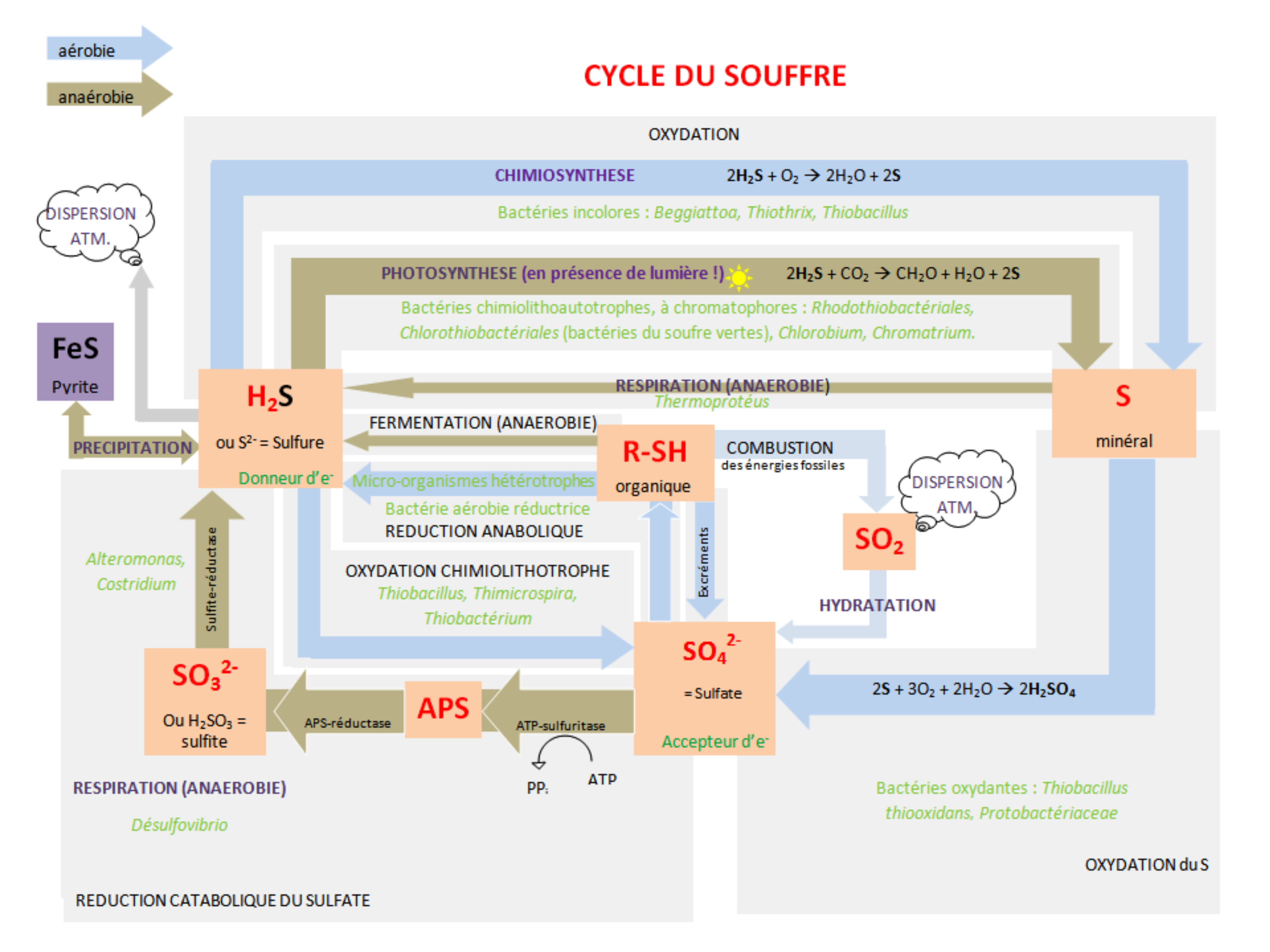 Schema du cycle du soufre Source dessin personnel